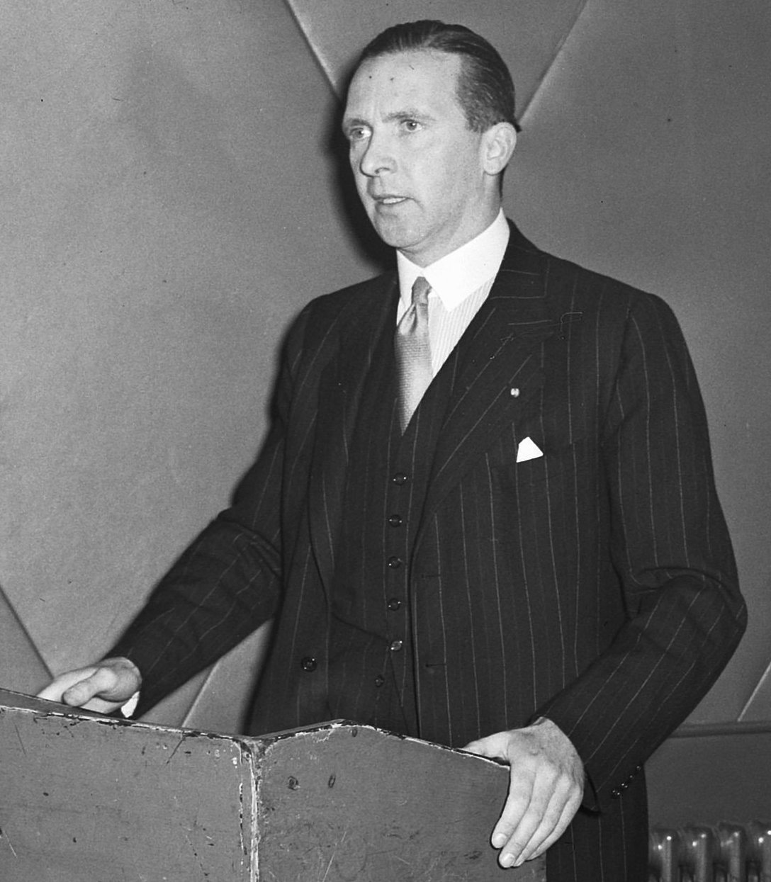 Collectie / Archief : Fotocollectie Anefo Reportage / Serie : [ onbekend ] Beschrijving : Jaarvergadering Algemeen Nederlands Verbond Krasnapolsky Amsterdam / Commissaris der Koningin in Friesland Linthorst Homan Datum : 3 oktober 1947 Locatie : Amsterdam, Noord-Holland Trefwoorden : Commissarissen, jaarvergadering Fotograaf : Bennekom, Ad van / Anefo Auteursrechthebbende : Nationaal Archief Materiaalsoort : Glasnegatief Nummer archiefinventaris : bekijk toegang 2.24.01.09 Bestanddeelnummer : 902-3980